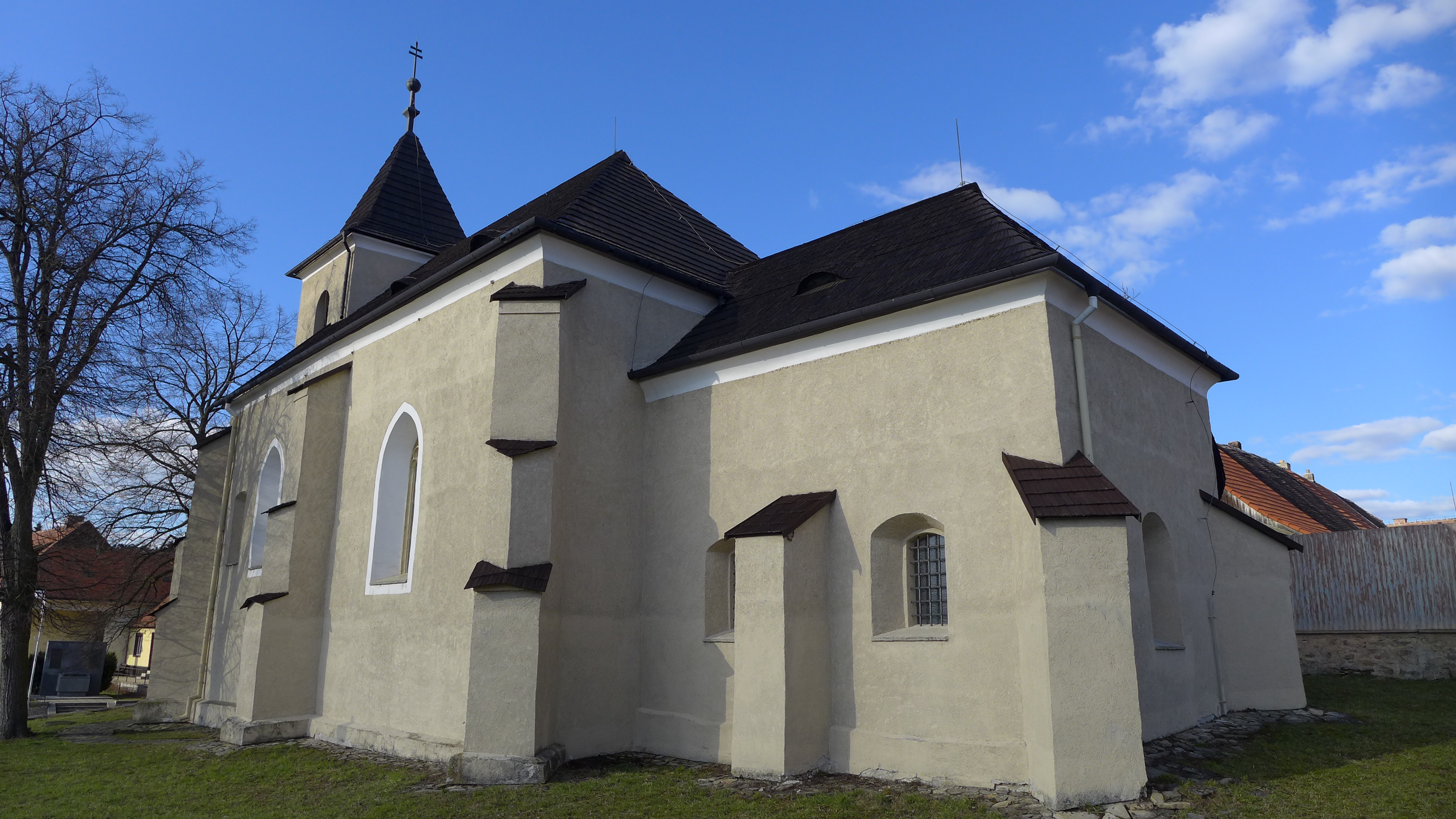 Kostel svatého Martina (Kralice nad Oslavou), v obci, Kralice nad Oslavou